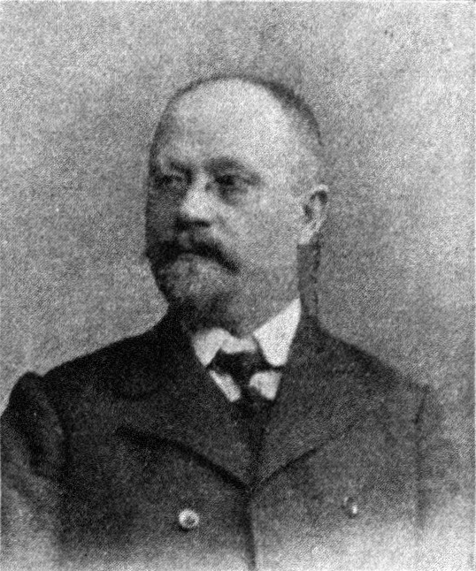 Österreichischer Politiker, Reichsratswahl 1907, Name siehe Dateiname